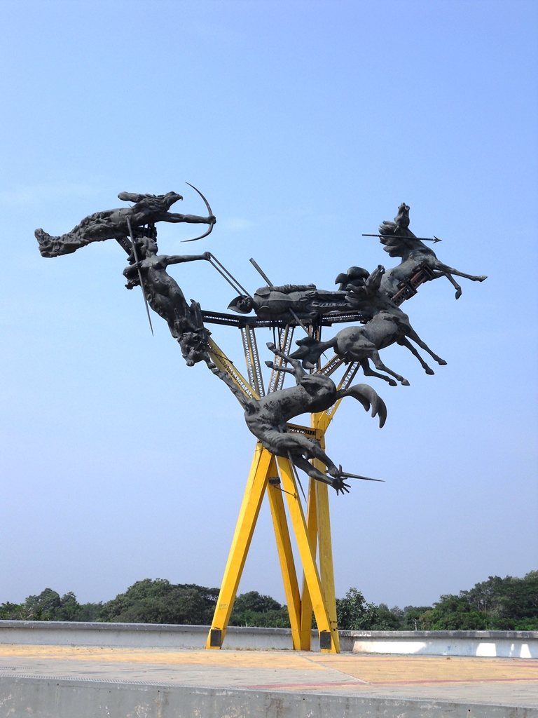 Monumento La Gaitana, ubicado en el Malecon Rio Magdalena